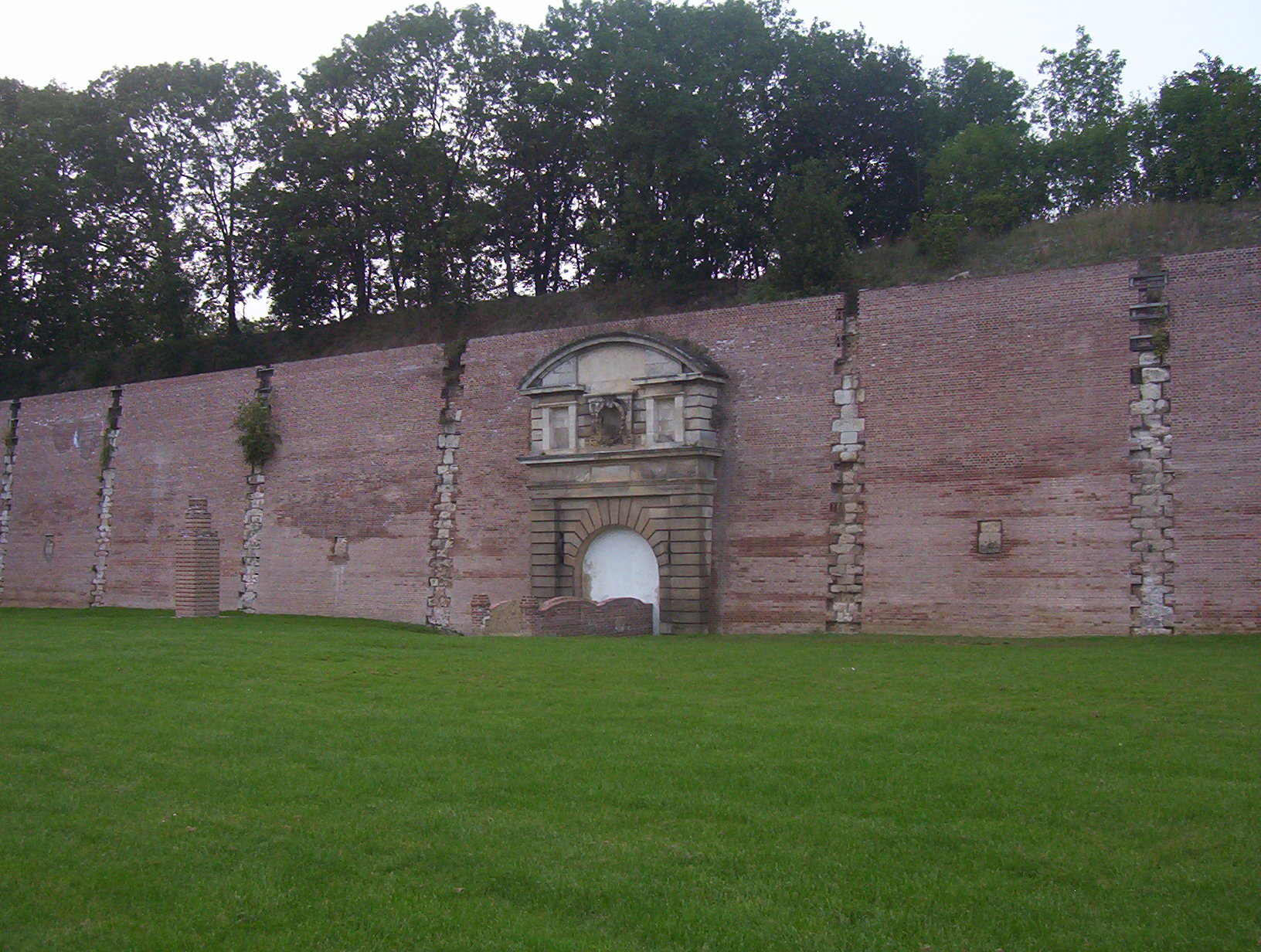 Citadelle d'Amiens. This building is en partie classé, en partie inscrit au titre des Monuments Historiques. .